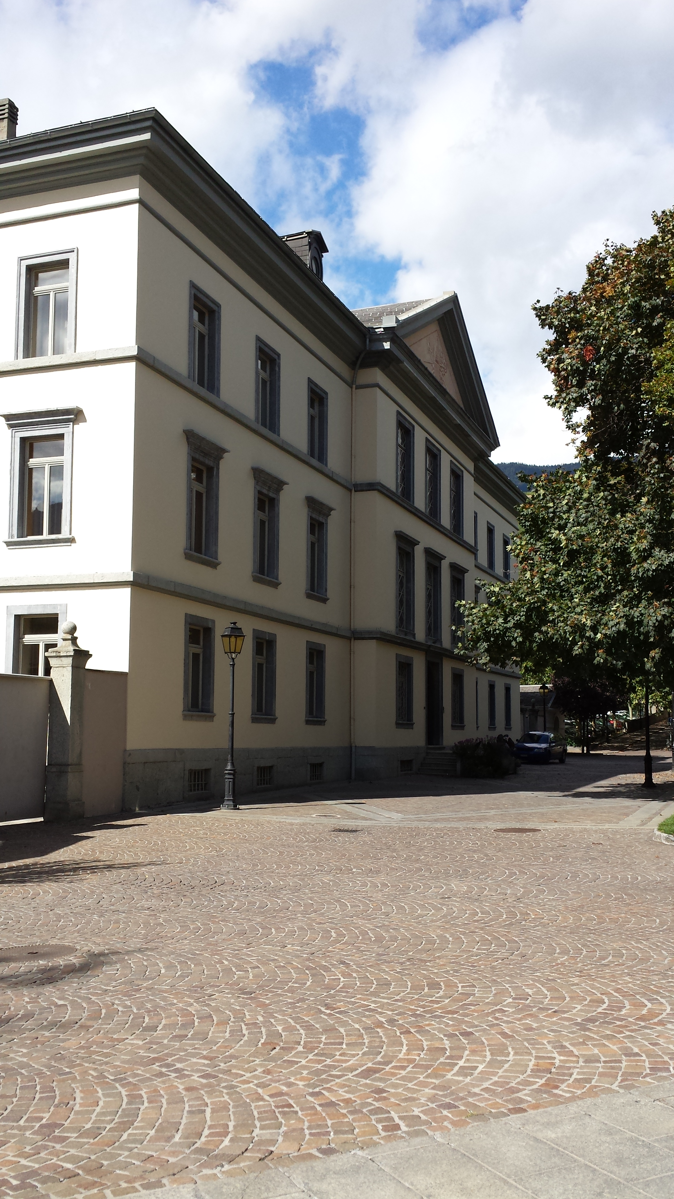 Bischofspalast